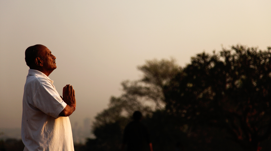 surya namaskar sun god yoga meditation India 2010